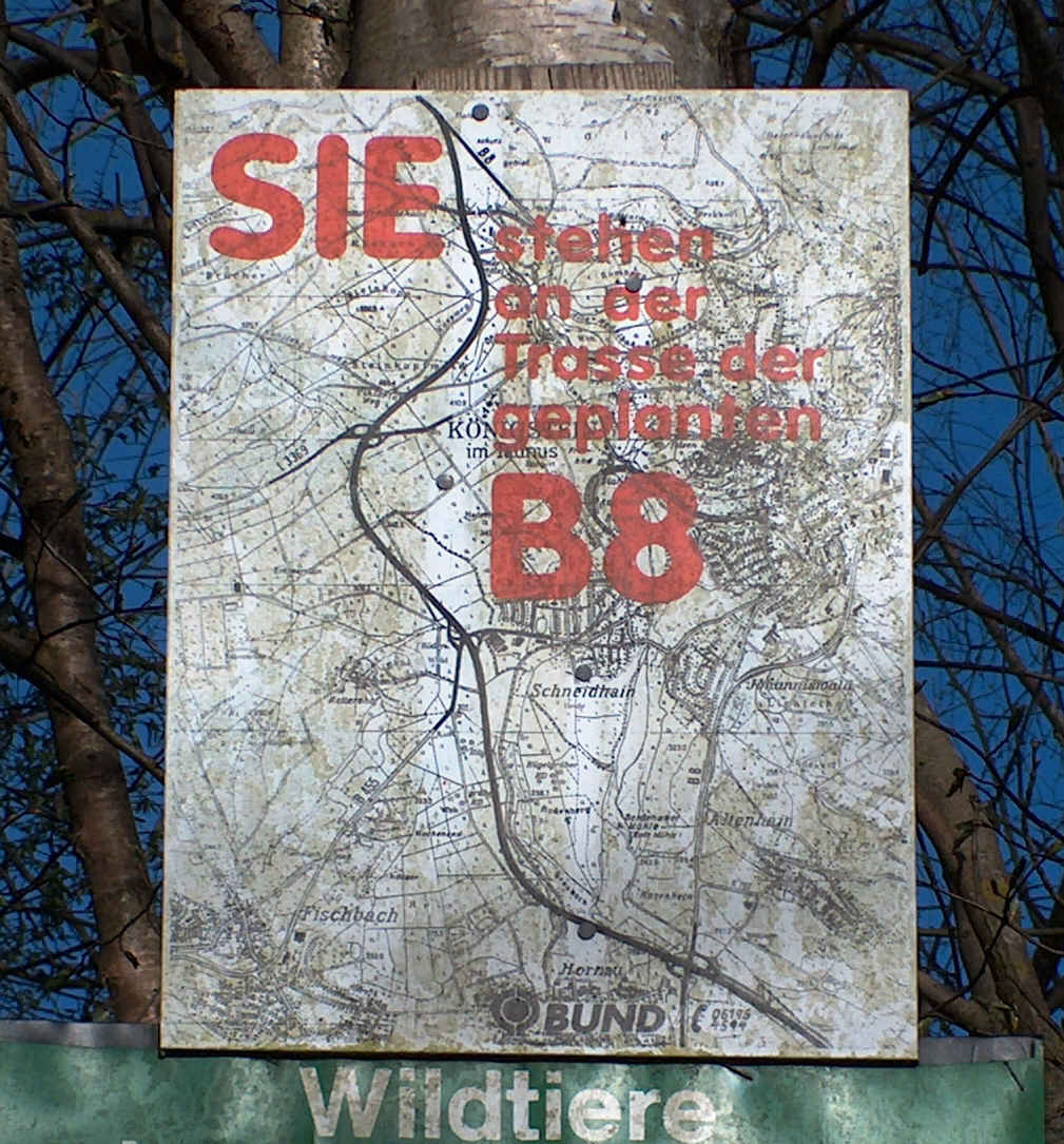 Protestplakat gegen den Ausbau der B8 nahe dem Rettershof in Kelkheim bei Frankfurt/Main